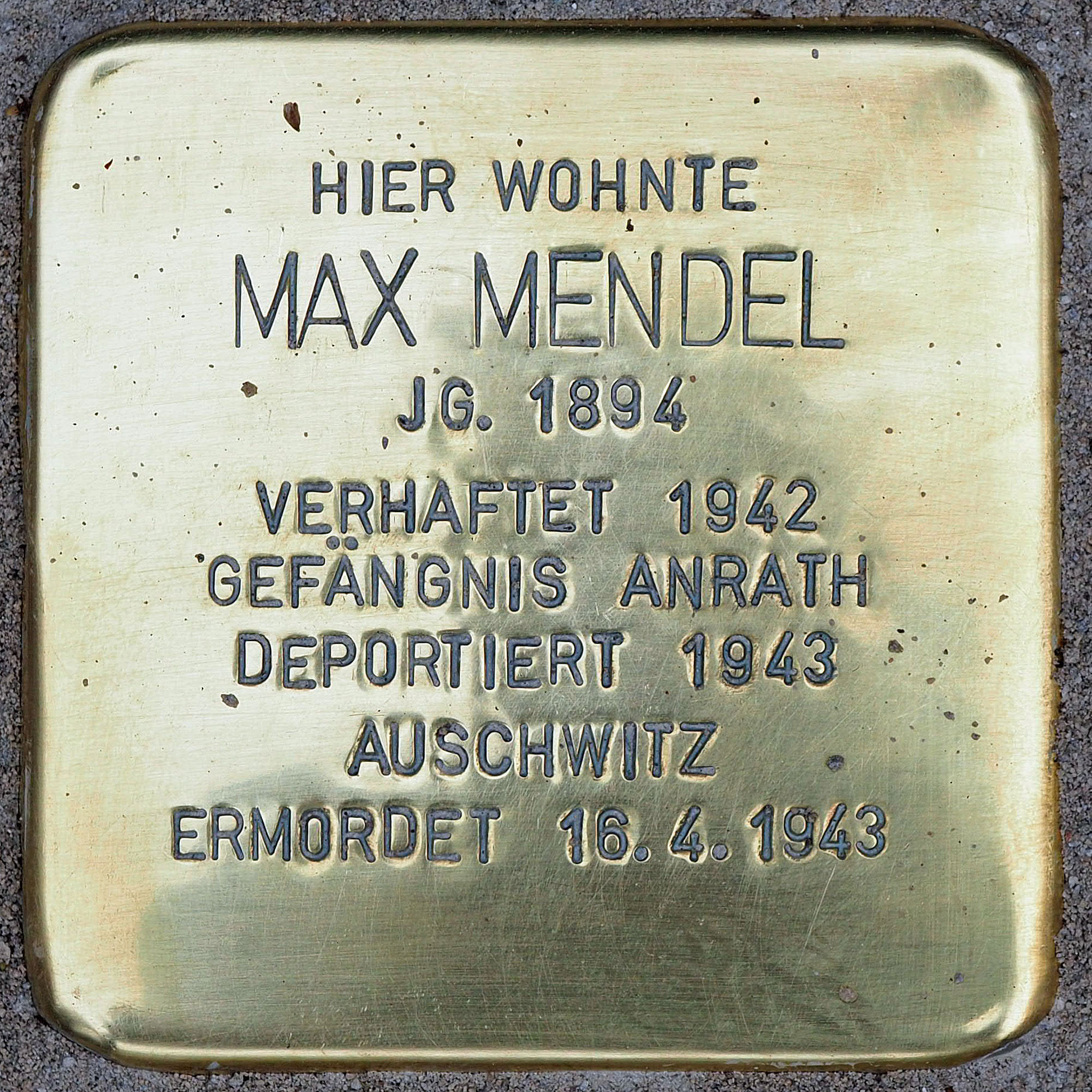 Stolpersteine in Kempen: Mendel, Max